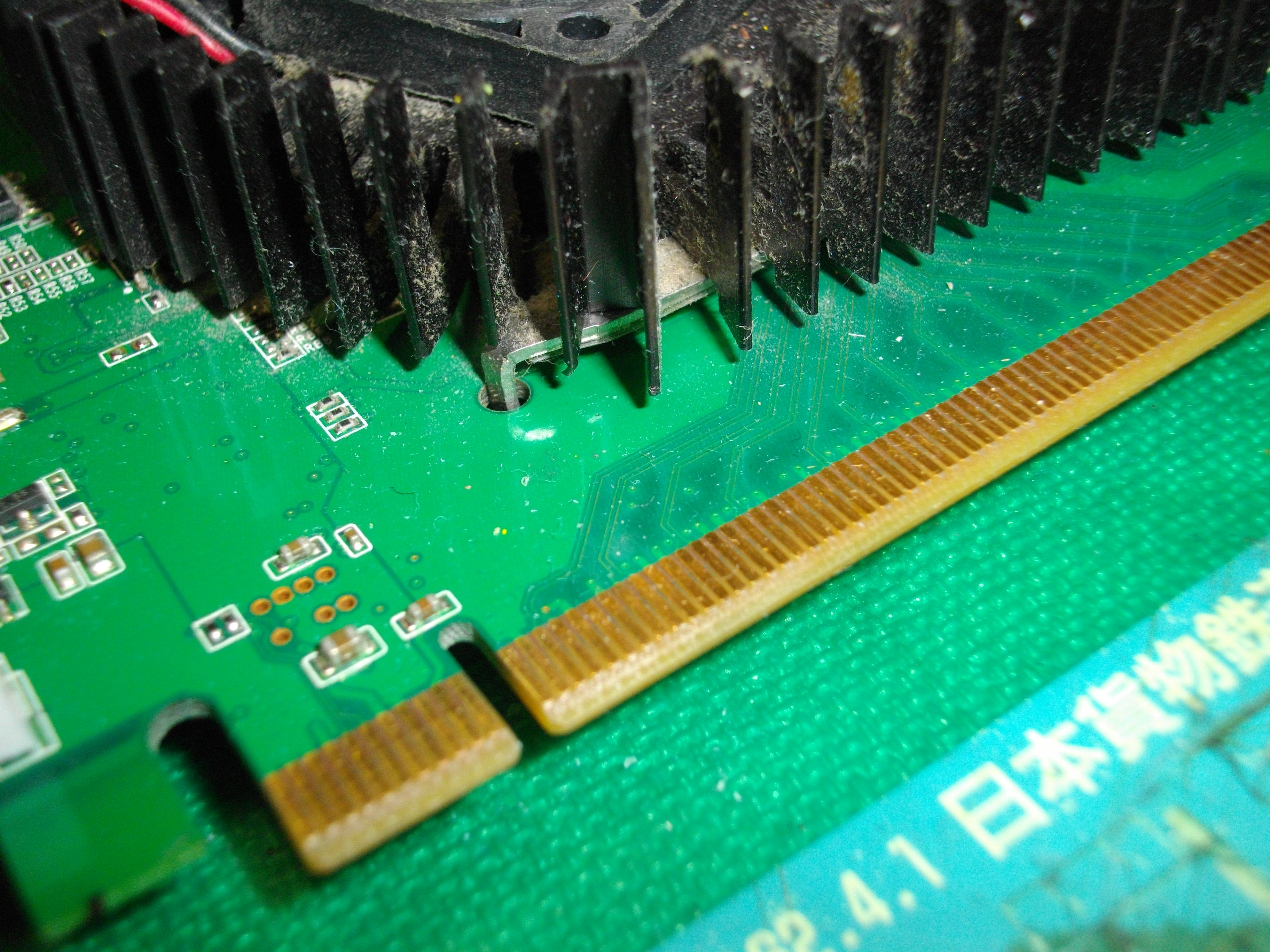 性能向上の為金メッキが施されたコンピュータ部品(グラフィックボード)の端子